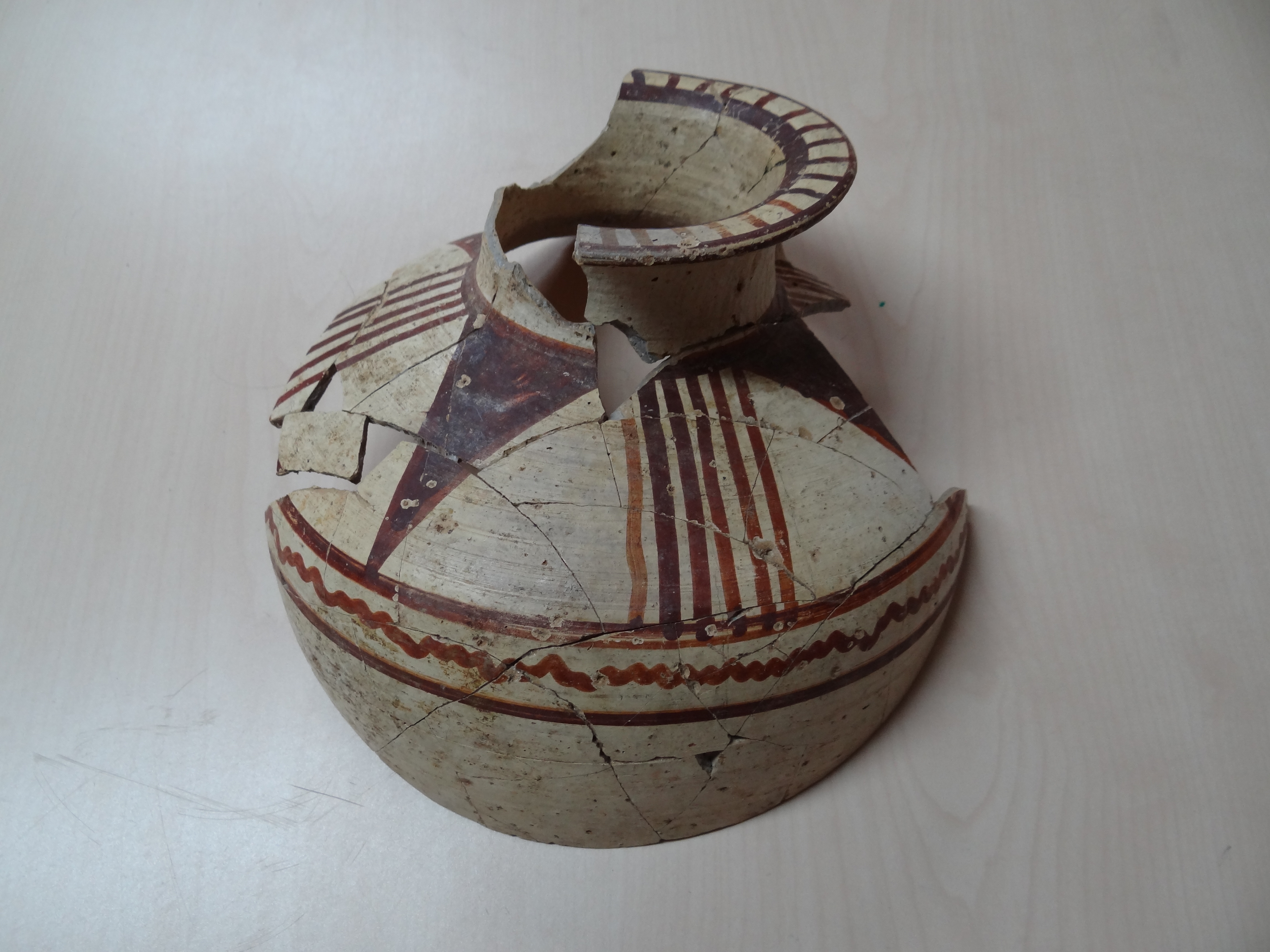 Chocolate-on-White ware is the description commonly given to an important diagnostic ceramic type. The pictures were taken in the collections room of the Department of Archaeology University of Haifa Chocolate on white ware jug משפחת שוקולד על לבן הוא שמה של משפחה קרמית מתקופת הברונזה התיכונה 2 ב' (MB IIb) והברונזה המאוחרת 1 קנקן התמונות צולמו בחדר האוספים של החוג לארכאולוגיה באוניברסיטת חיפה